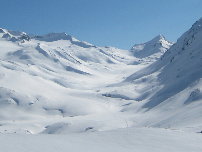 Piz Alv (2768 m) am Abschluss des Val Maighels rechts des Passo Bornengo (2631 m)